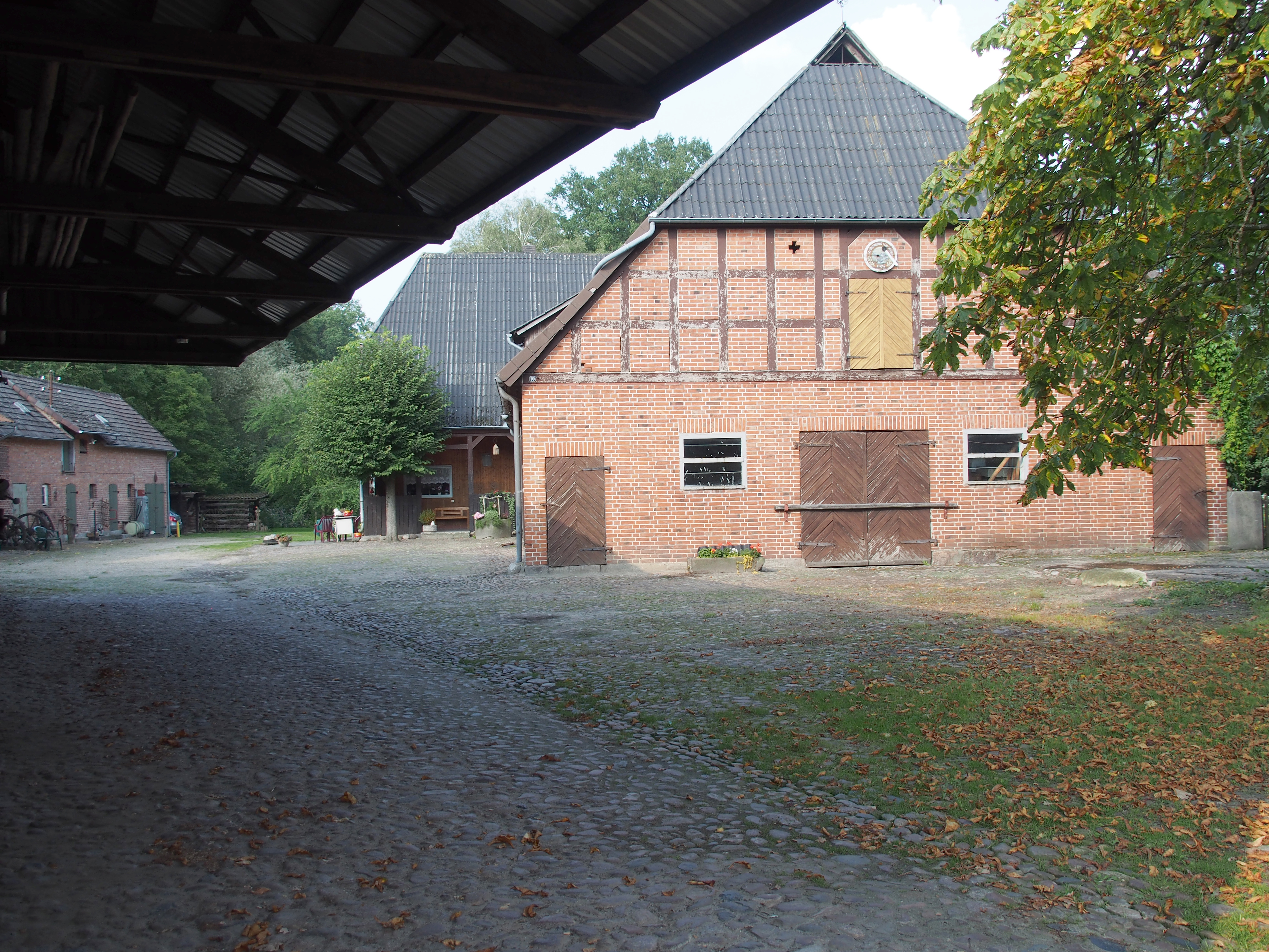 Bauernhaus in Fachwerkbauweise Heerstr., Scharnhorst, Gemeinde Eschede, Landkreis Celle